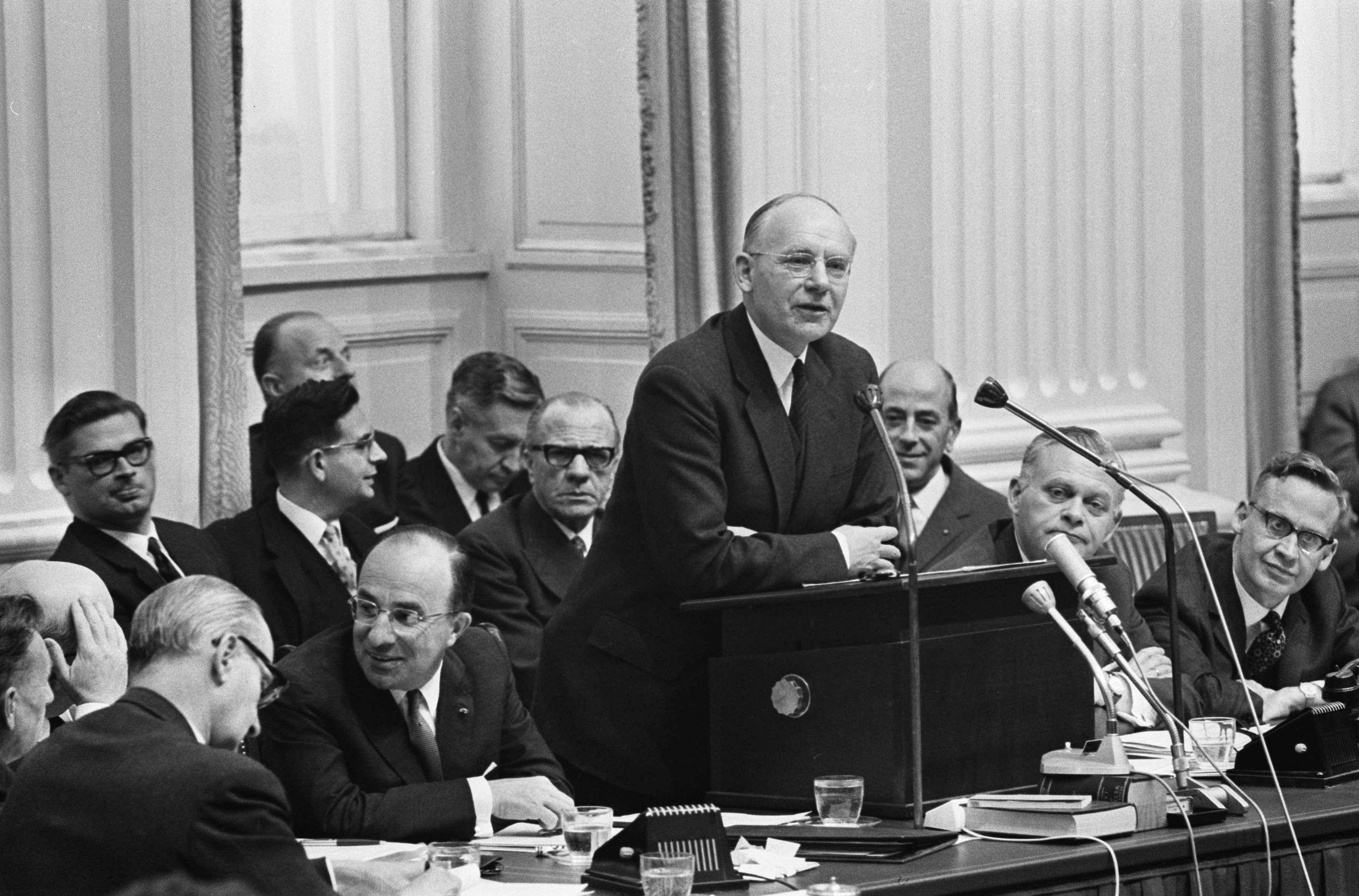 Collectie / Archief : Fotocollectie Anefo Reportage / Serie : Algemene Politieke Beschouwingen in de Tweede Kamer te Den Haag Beschrijving : Minister Vondeling van Financiën tijdens zijn rede Datum : 14 oktober 1965 Locatie : Den Haag, Zuid-Holland Trefwoorden : ministers, parlementaire debatten, politiek, toespraken Persoonsnaam : Vondeling, Anne Fotograaf : Eric Koch / Anefo Auteursrechthebbende : Nationaal Archief Materiaalsoort : Negatief (zwart/wit) Nummer archiefinventaris : bekijk toegang 2.24.01.05 Bestanddeelnummer : 918-3130